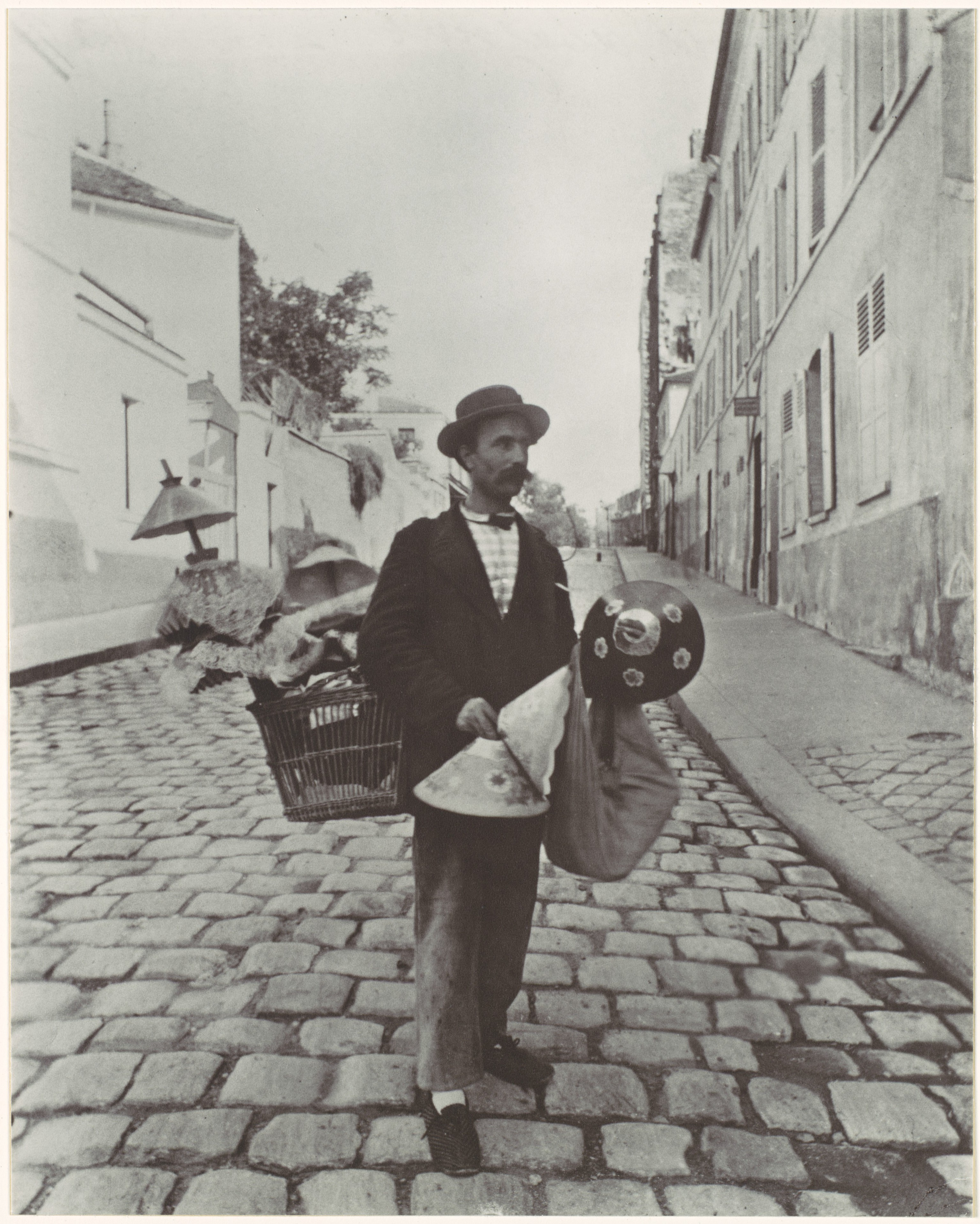 Marchand d'abat-jour, rue Lepic, Paris